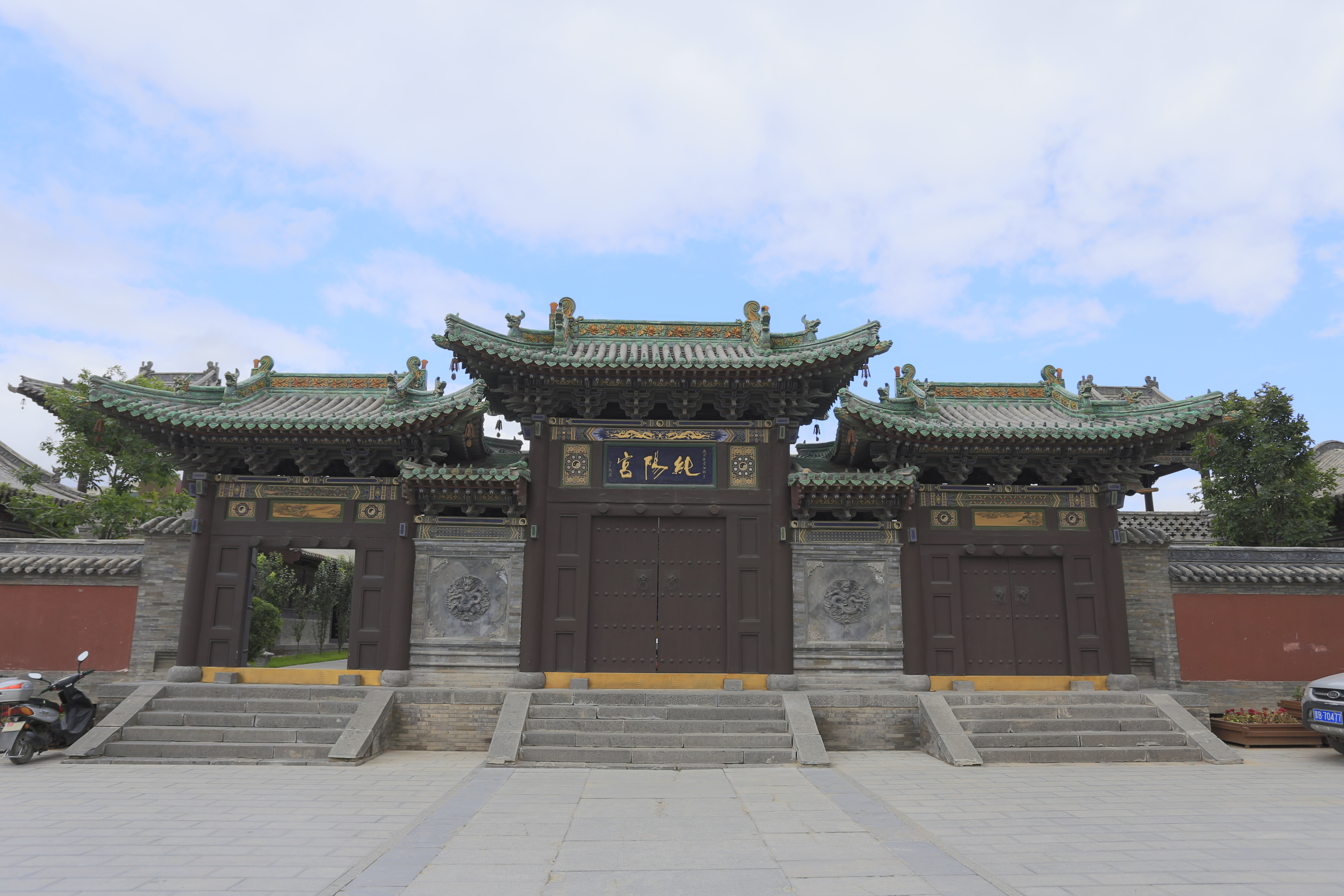 大同纯阳宫—— 山门